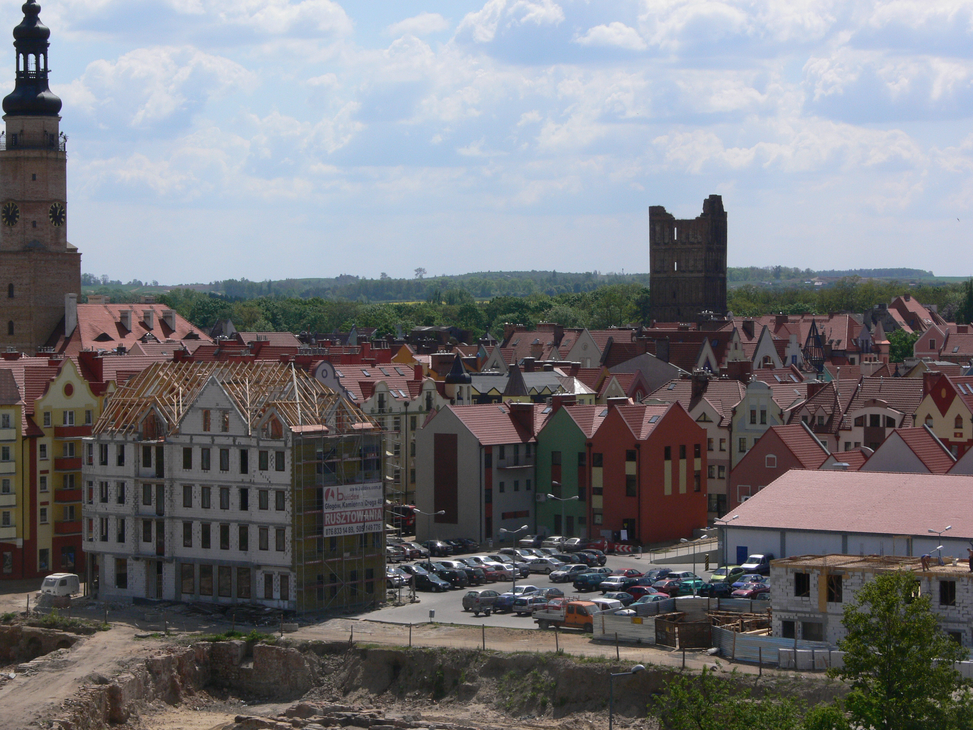 Stare Miasto w Głogowie w oddali wieża ratuszowa i wieża kościelna